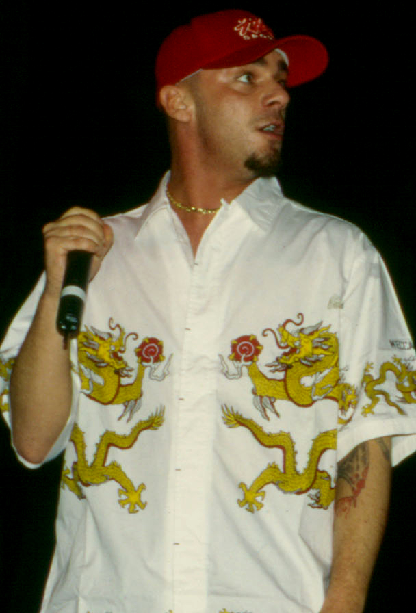 J-Ax durante un concerto.